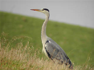 Ardea cinerea *